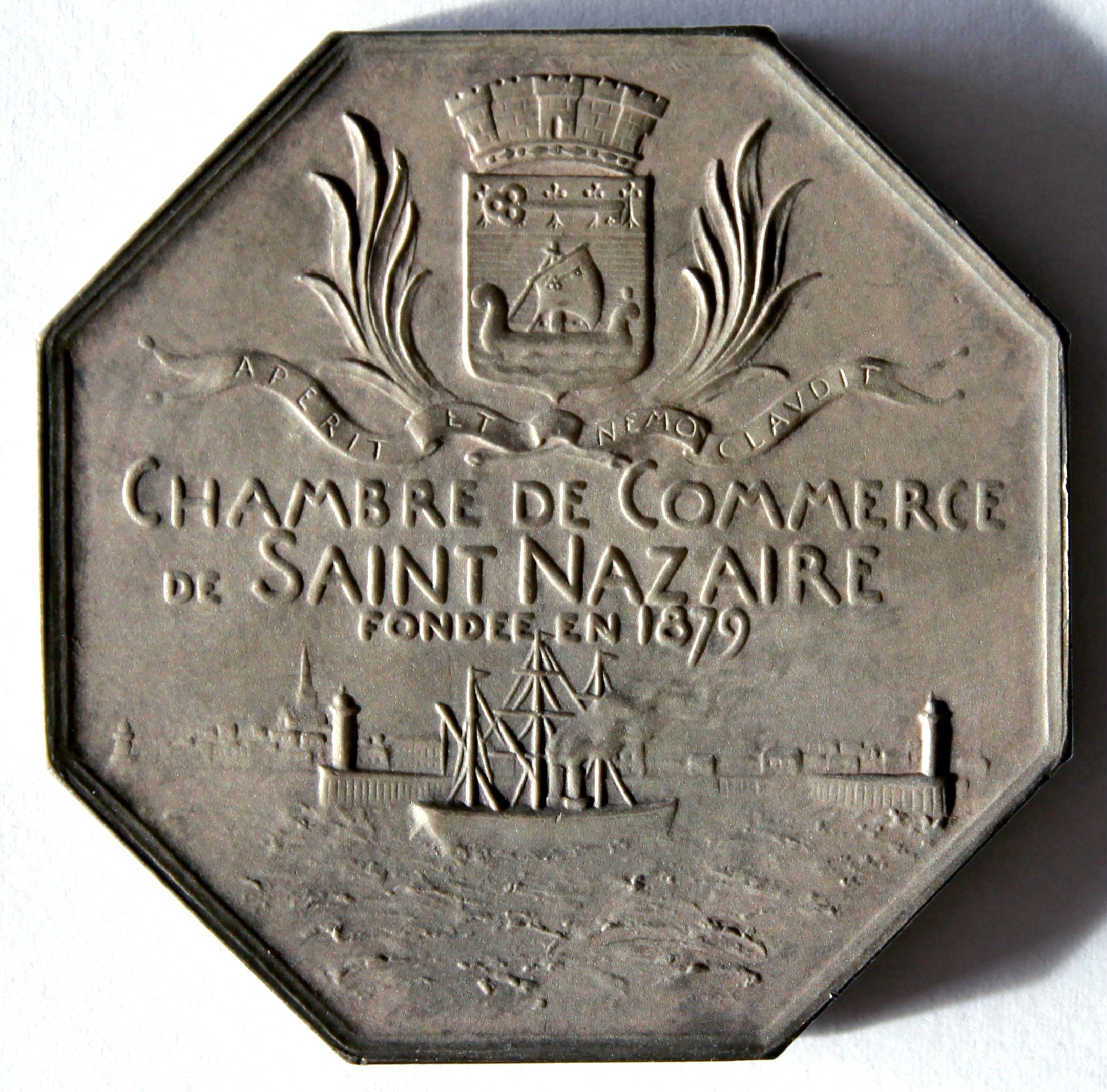 Médaille de la Chambre de Commerce de Saint Nazaire par Oscar Roty. Le port de Saint-Nazaire et les armoiries de la ville avec la devise APERIT ET NEMO CLAVDIT "Il ouvre et personne ne ferme" Médaille octogonale argent (41mm)